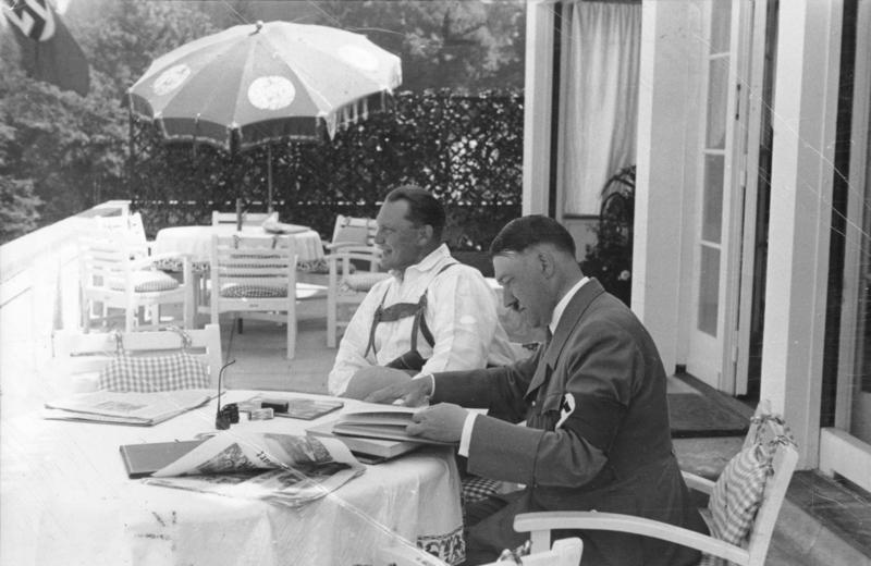 Obersalzberg, Hermann Göring, Adolf Hitler Ein Urlaubstag des Kanzlers in seinem Hause auf dem Obersalzberg bei Berchtesgaden. Auch in der Urlaubszeit arbeitet der Kanzler, neben ihm sitzend Ministerpräsident Göring. 490-38 [Obersalzberg.- Hermann Göring und Adolf Hitler (lesend) auf Terrasse sitzend] Abgebildete Personen: Hitler, Adolf: Reichskanzler, Deutschland Göring, Hermann: Reichsmarschall, Oberbefehlshaber der Luftwaffe, Ministerpräsident von Preußen, Deutschland